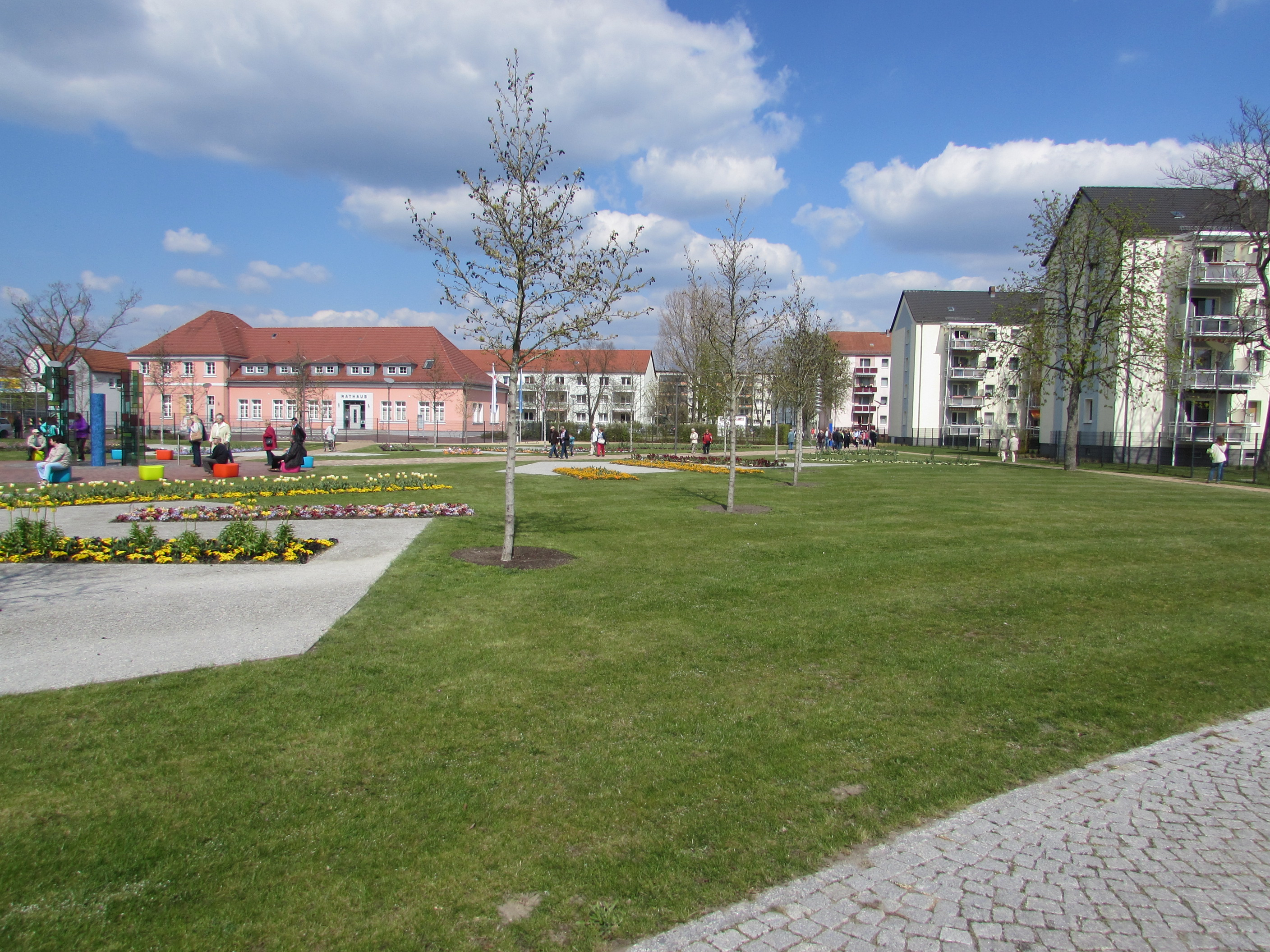 bugapark premnitz